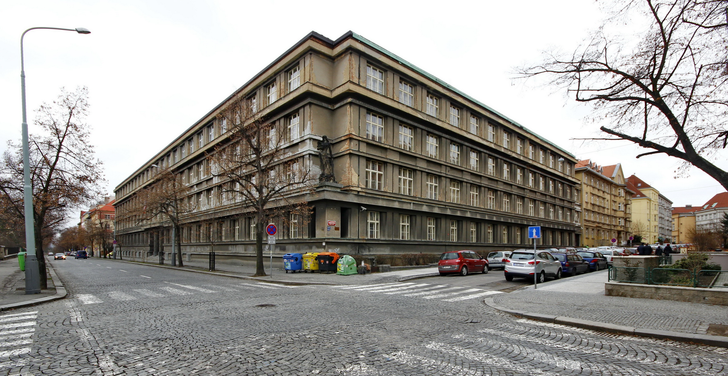 Praha 6 - Bubeneč, Vojenský zeměpisný ústav, architekt Bedřich Feuerstein, 1921-1925